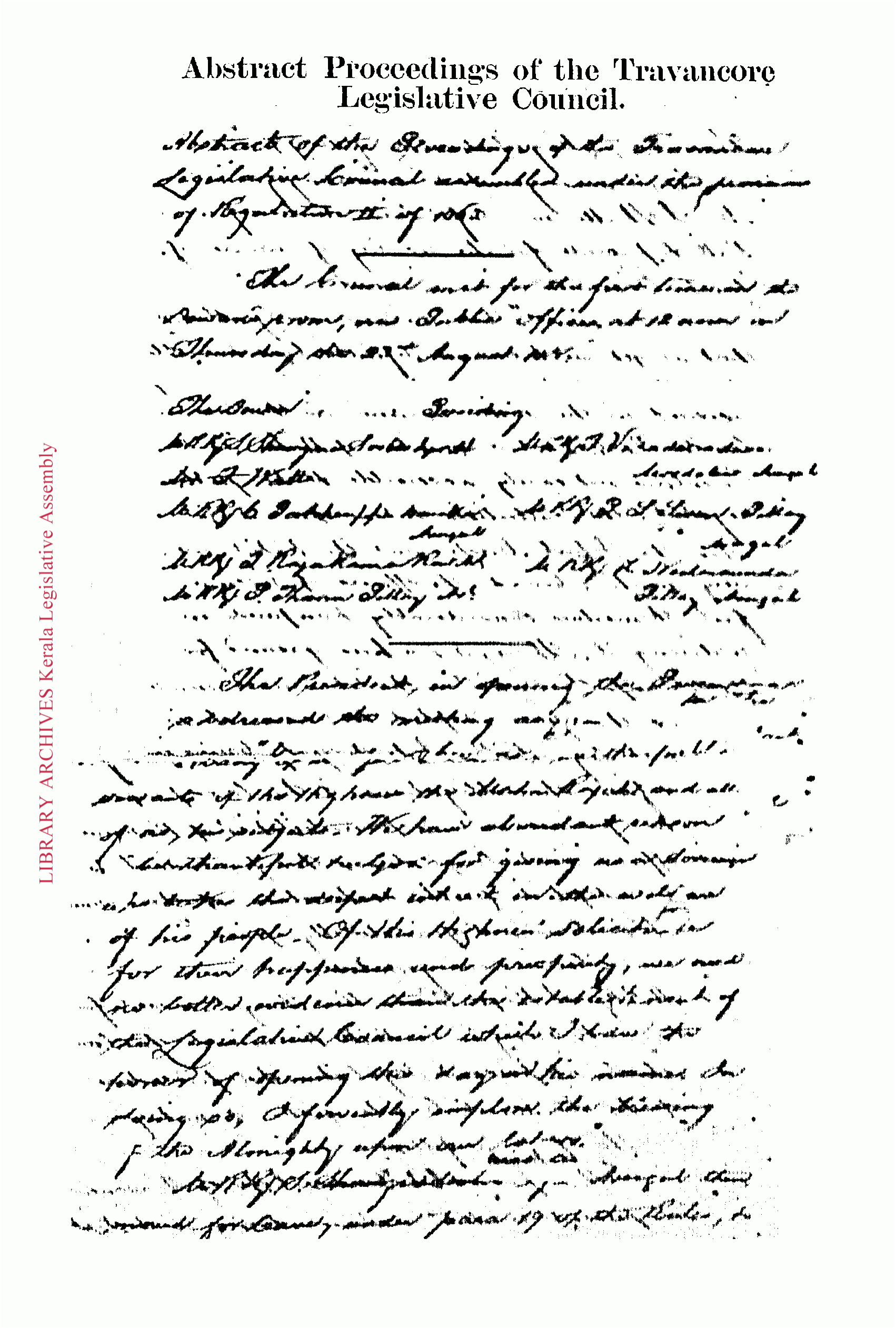 ട്രാവൻകൂർ ലെജിസ്ലേറ്റീവ് കൗൺസിലിന്റെ 1888 ഓഗസ്റ്റ് 23-നു നടന്ന യോഗത്തിന്റെ മിനിട്ട്സിന്റെ ആദ്യ പേജ്